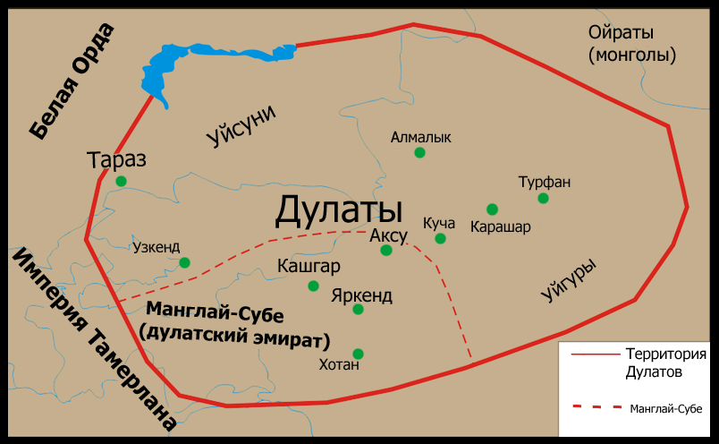 Родина Племени Дулат